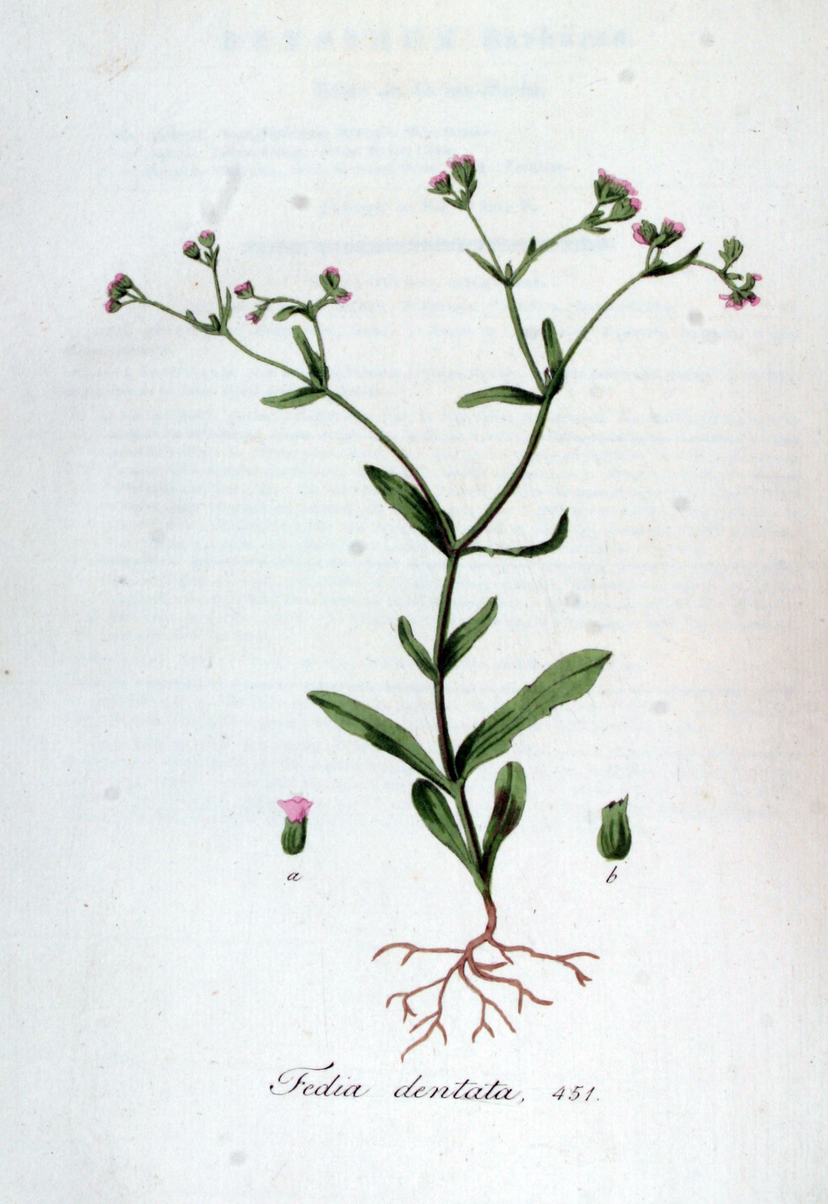 Valerianella dentata (L.) Pollich (Syn. Fedia dentata (L.) Bernh.)